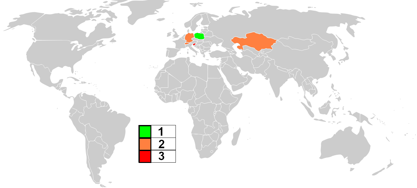 Kraje, w których Kamil Stoch stawał na podium w zawodach Letniego i Zimowego Pucharu Kontynentalnego